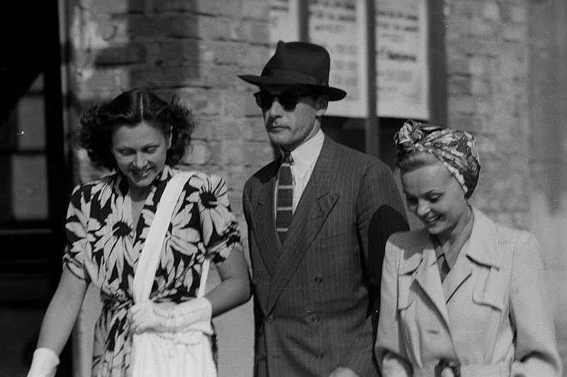 Original image description from the Deutsche Fotothek Hertha Feiler, Bruni Löbel sowie eine weitere Person